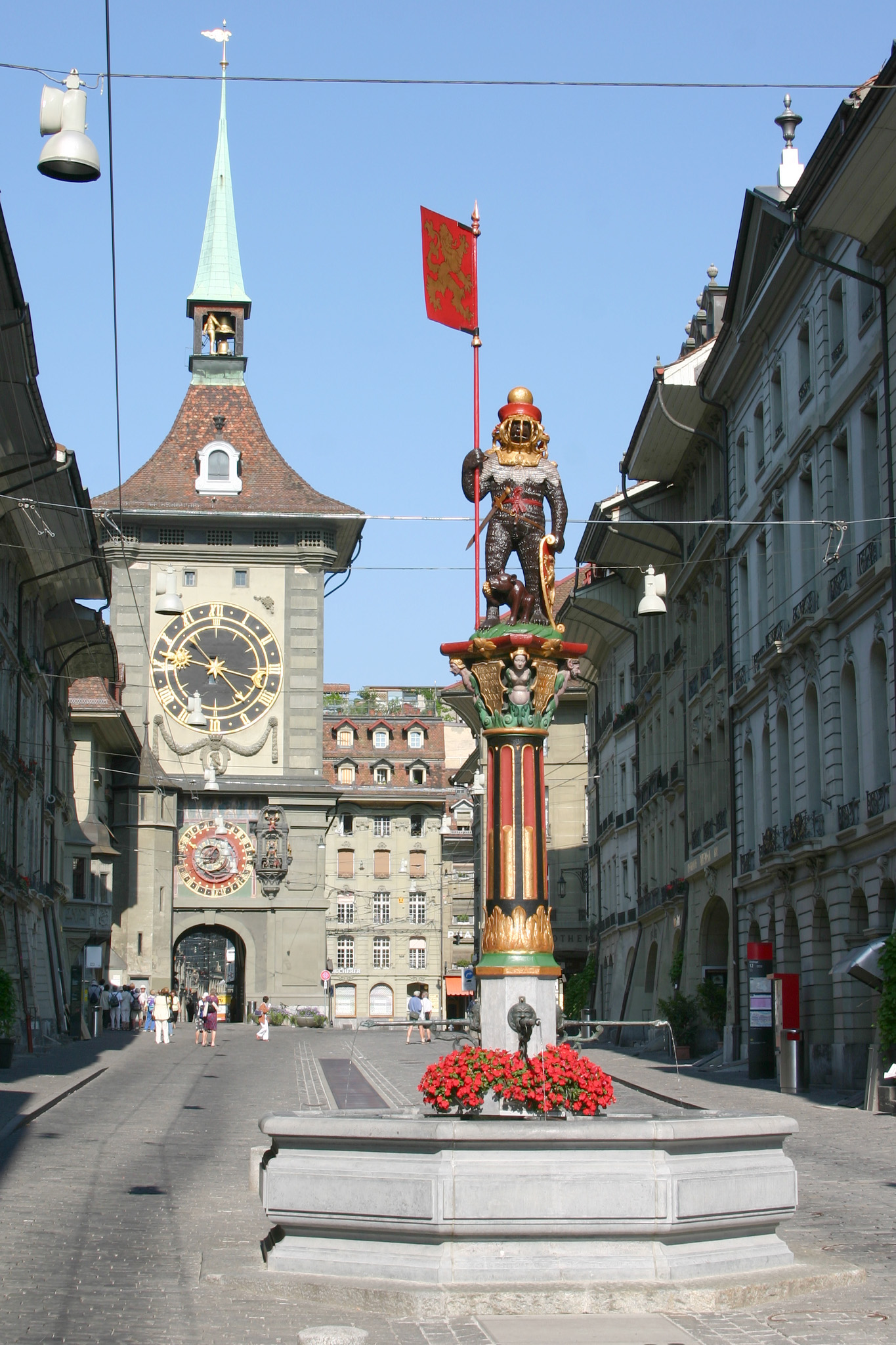 Zähringer Brunnen, Bern, Switzerland